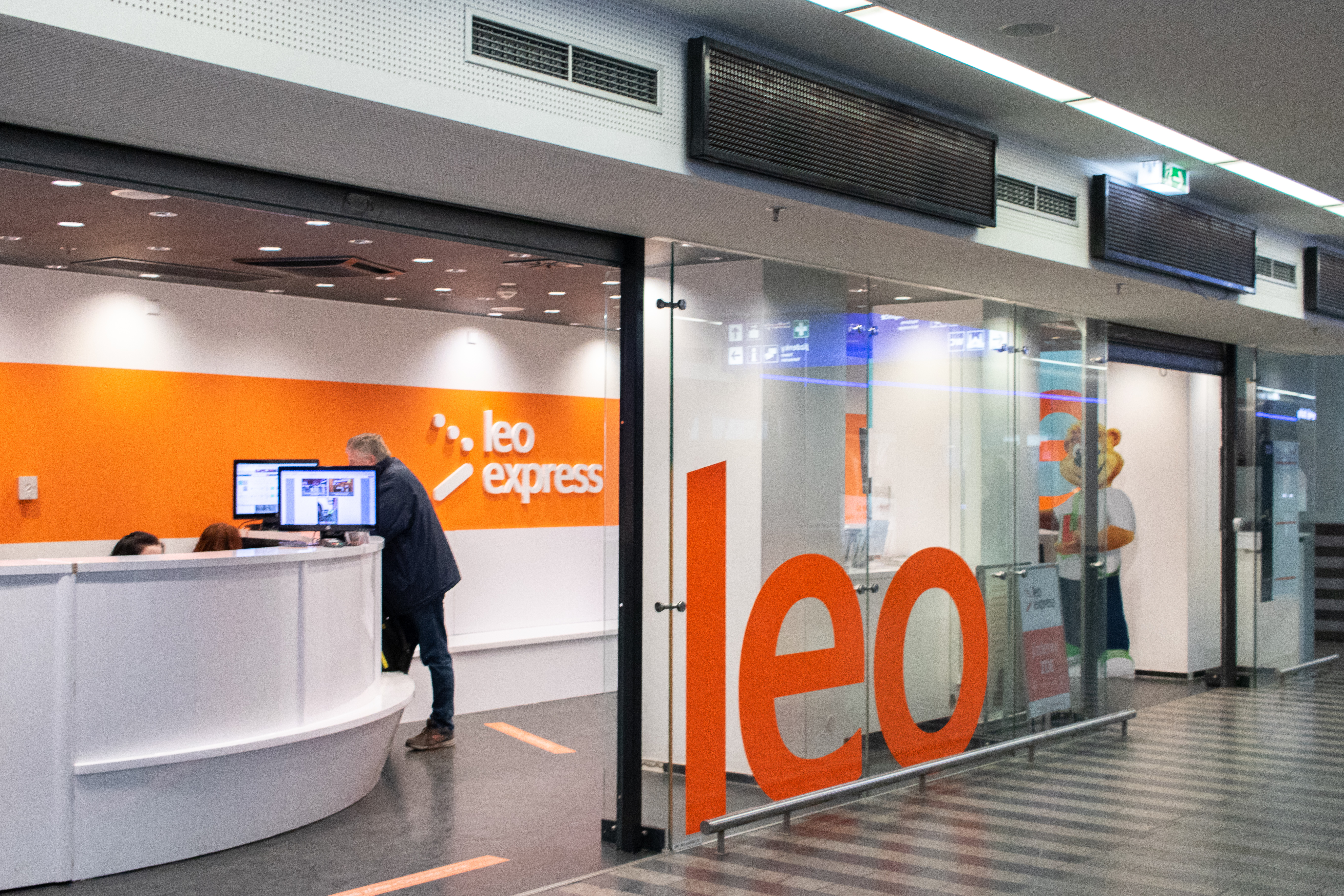 Pokladna Leo Express v Praze po rebrandingu, únor 2019